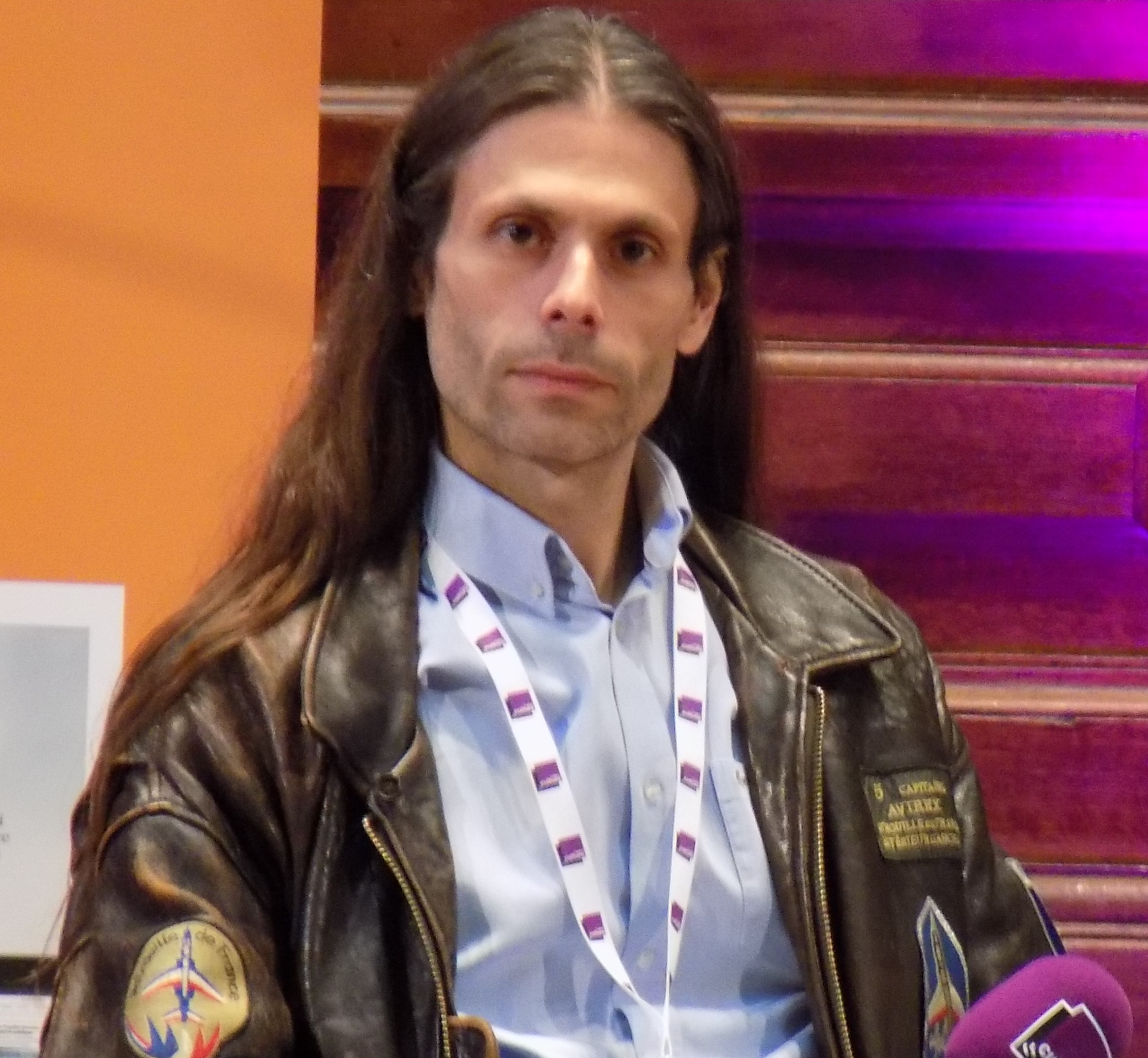 Aurélien Barrau, lors du forum « L’année vue par… Les Sciences » organisée par France Culture, le 25 février 2017.